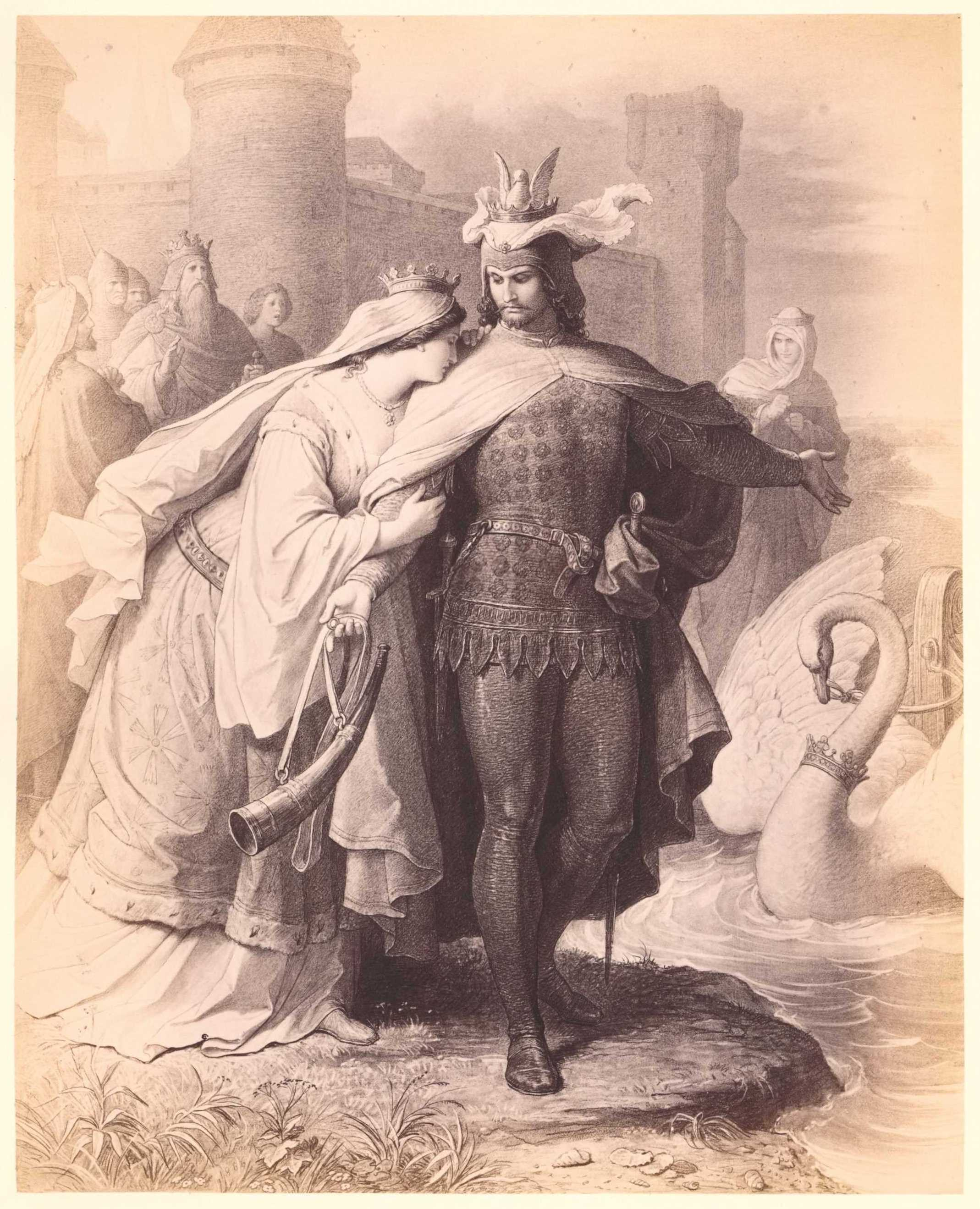 Richard-Wagner-Galerie. Nach den auf allerhöchsten Befehl Sr. Majestät König Ludwig II. von Bayern ausgeführten Cartons von Wilh. von Kaulbach und Theodor Pixis. Photographiert von Jos. Albert. Mit Biographie Richard Wagners und erläuterndem Text von Wilhelm Tappert. Berlin, Verlag von Hanfstaengl’s Nachfolger. Blatt: Lohengrin’s Abschied